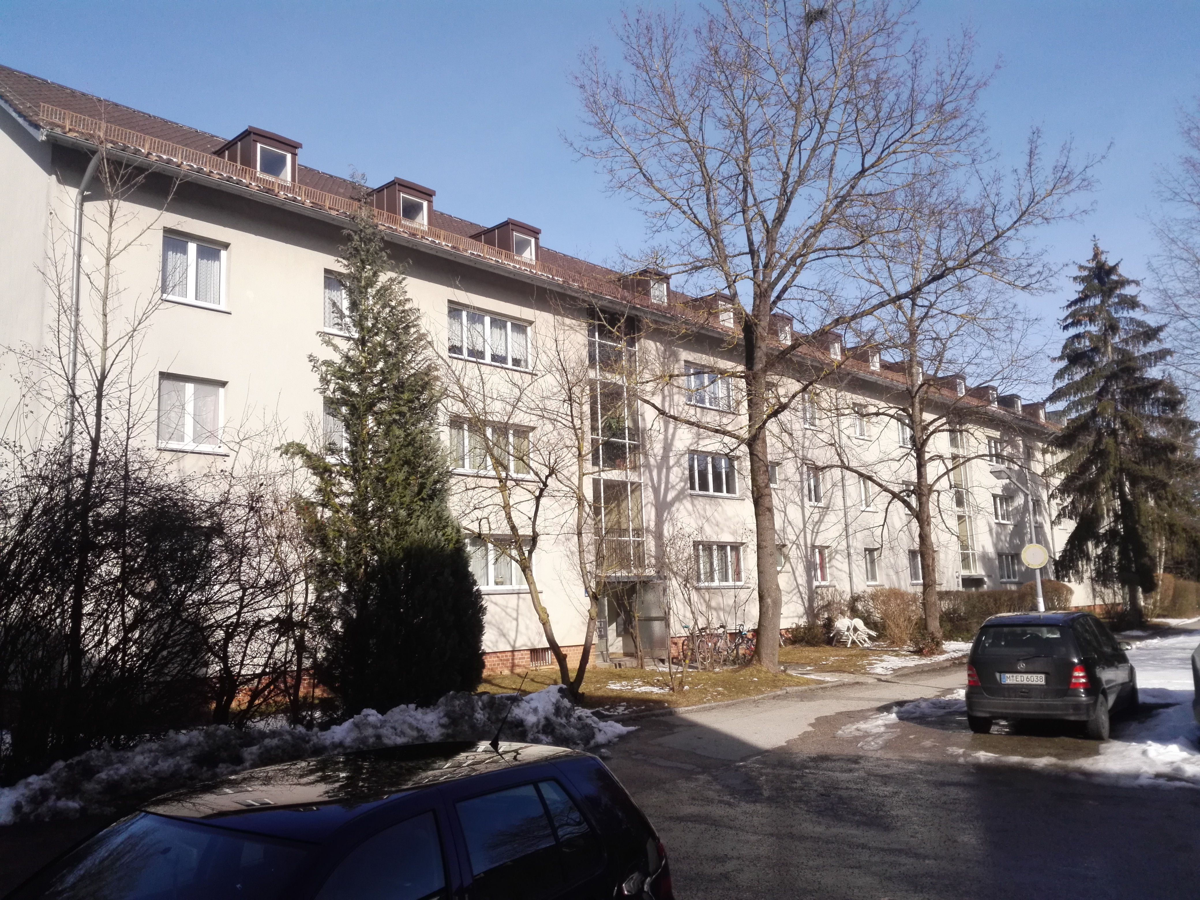 Wohnblock Rockefellerstrasse 68–72 (Südseite), München